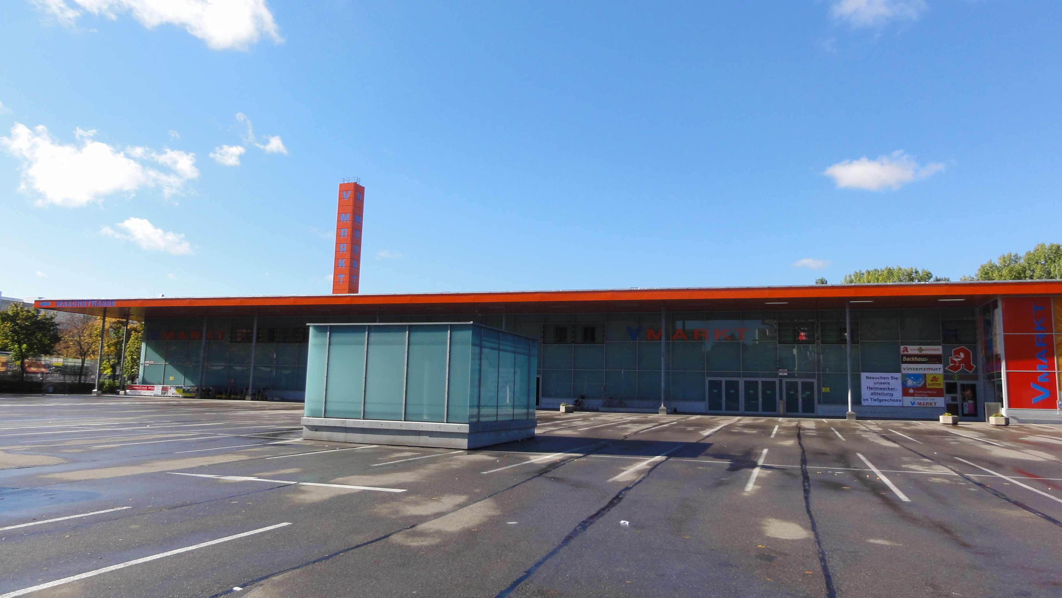 Munich, Balanstr. 50